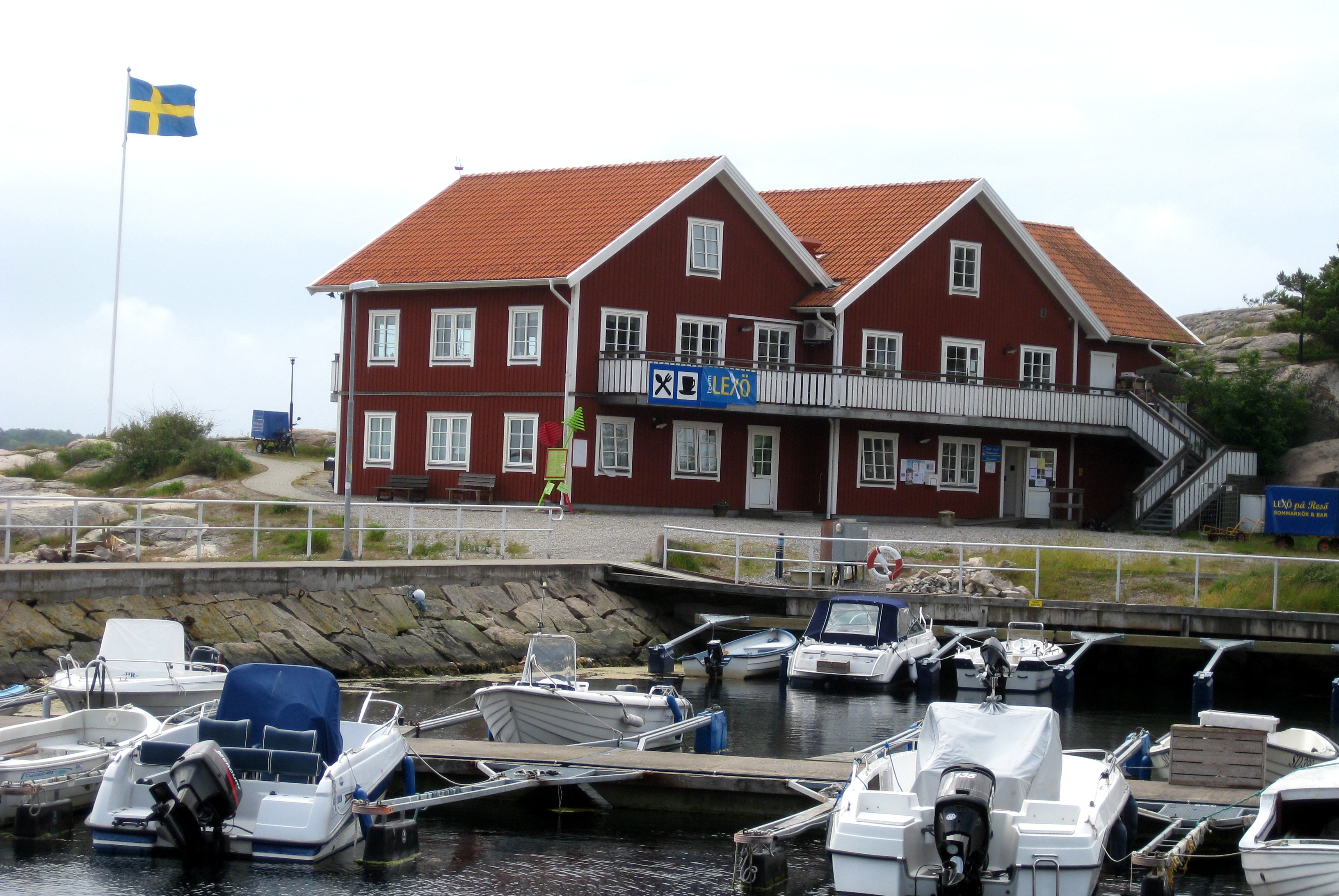 Restaurangen "Lexö på Resö" sedd från nordost.